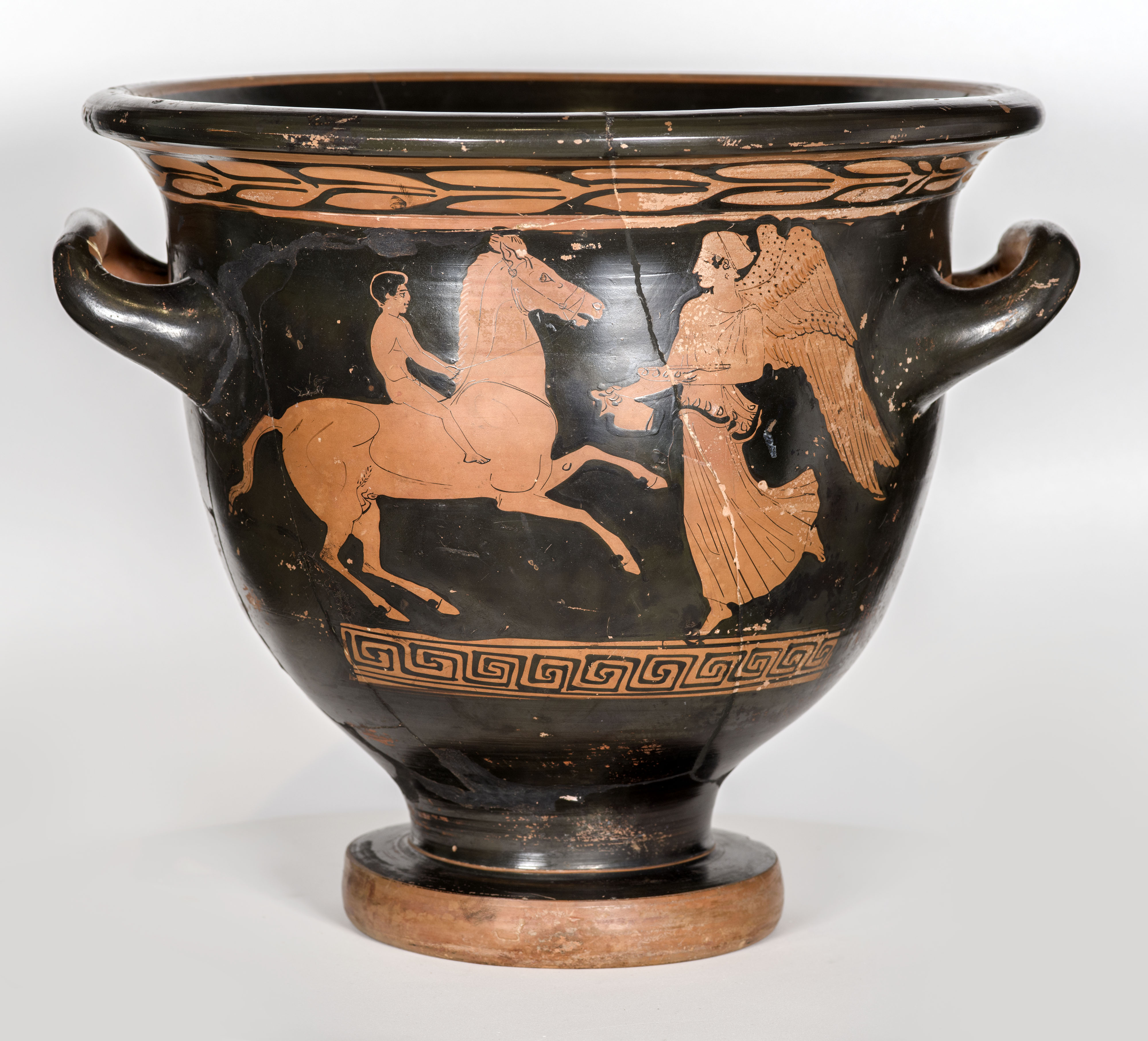 Cara A de crátera de campana con escena de una Niké alada que sostiene un enócoe y una fiale para hacer una libación en honor del joven jinete desnudo, ganador de un certamen deportivo, el cual monta un caballo encabritado. La crátera se halló en la tumba 11 localizada en la zona I de la necrópolis ibérica de Tútugi, Galera (Granada). Altura: 27 cm; diámetro boca: 29 cm; diámetro en la base del pie: 14 cm. Grupo de Polignotos. Cultura ibera. Nº inventario 1979/70/GAL/T11/2. Museo Arqueológico Nacional de España.